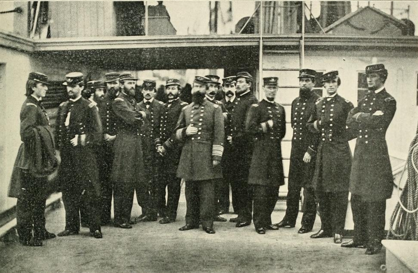 David Dixon Porter